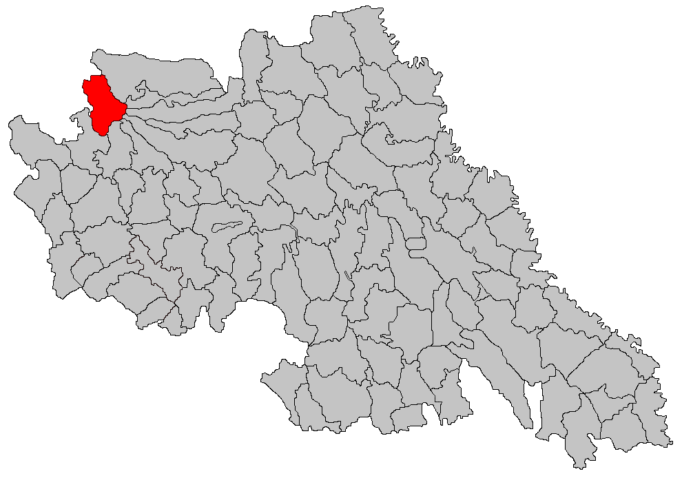 Categorie:Hărţi ale judeţului Iaşi